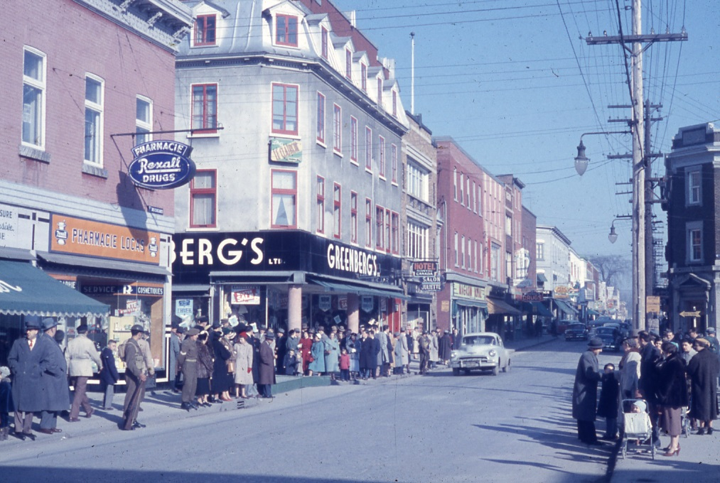 Diapositive couleur illustrant la rue des Cascades à Saint-Hyacinthe dans la région administrative de la Montérégie.